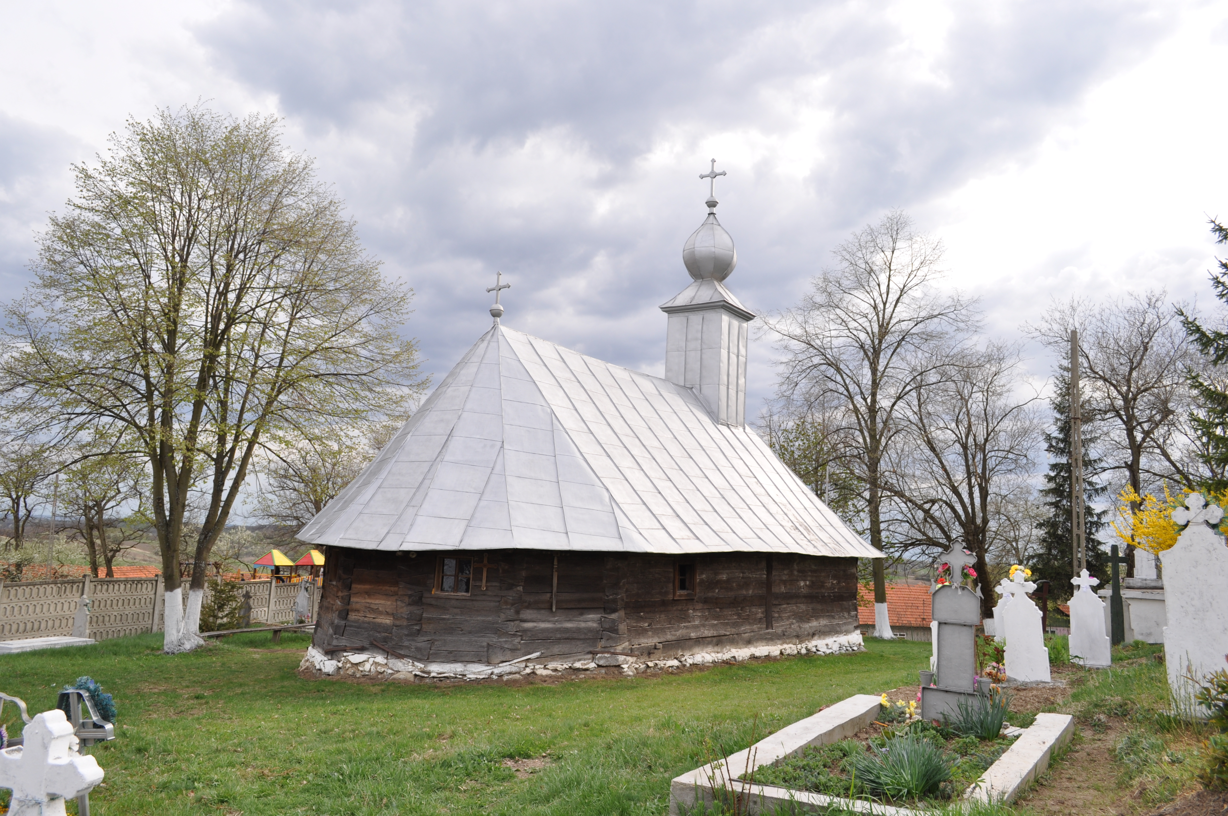 Biserica de lemn "Sfântul Dumitru" , sat DUBEŞTI; comuna OHABA LUNGĂ